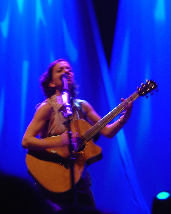 Ani DiFranco in concert, 2005.